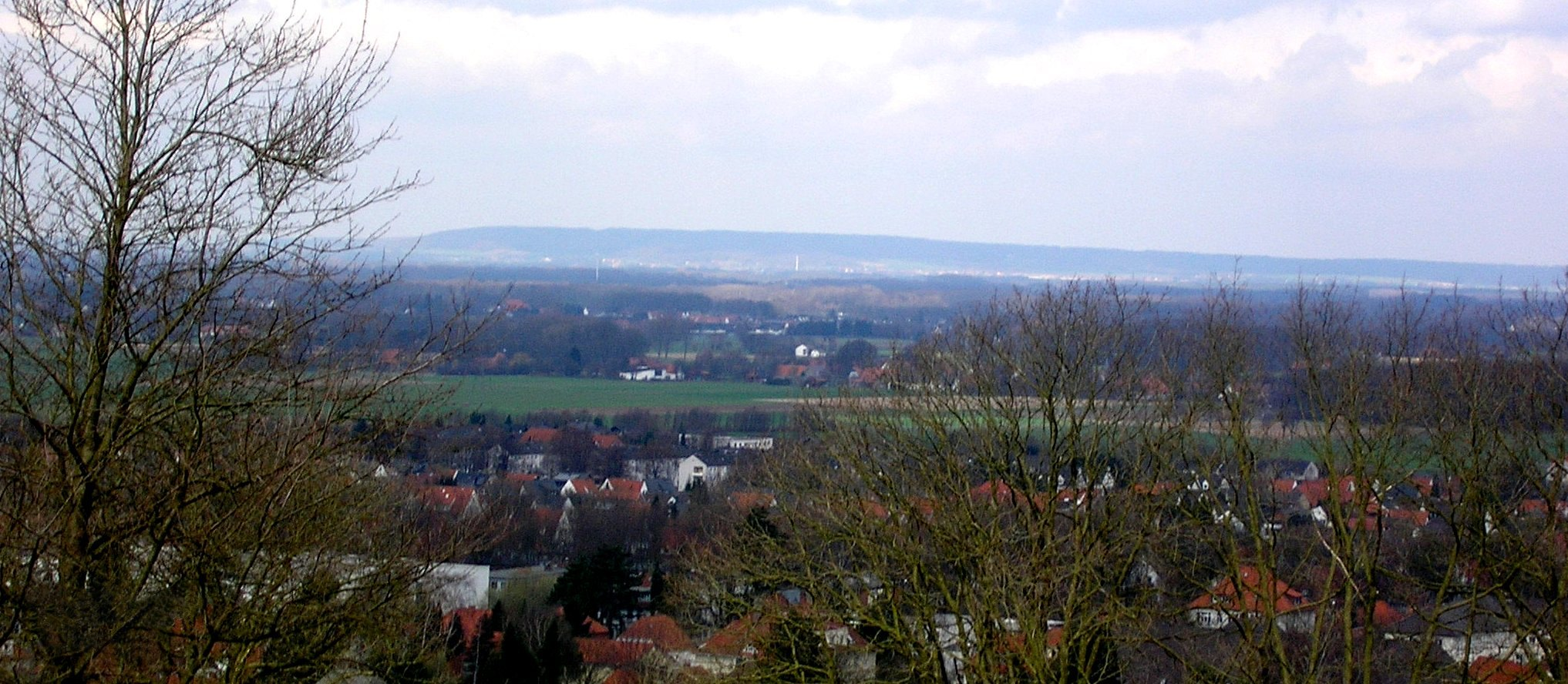 Stemweder Berg vom Wiehengebirge bei Lübbecke aus.